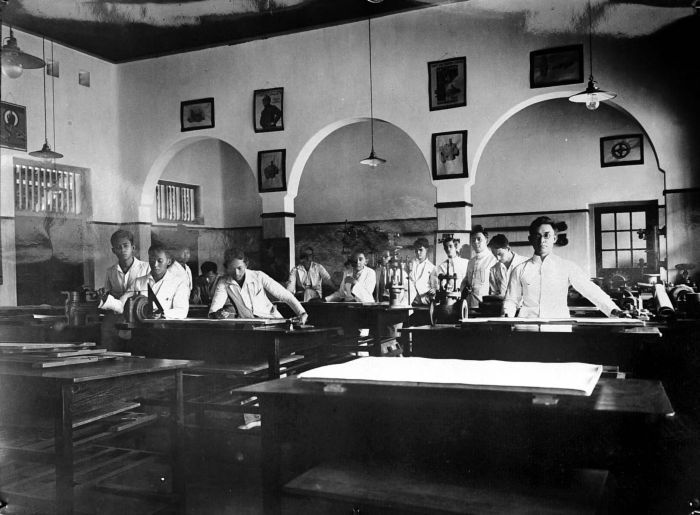 Repro Negatif. Ruang/studio menggambar teknik untuk siswa bagian mesin dari Sekolah Teknik (Prinses Juliana School) di Yogyakarta, Jawa